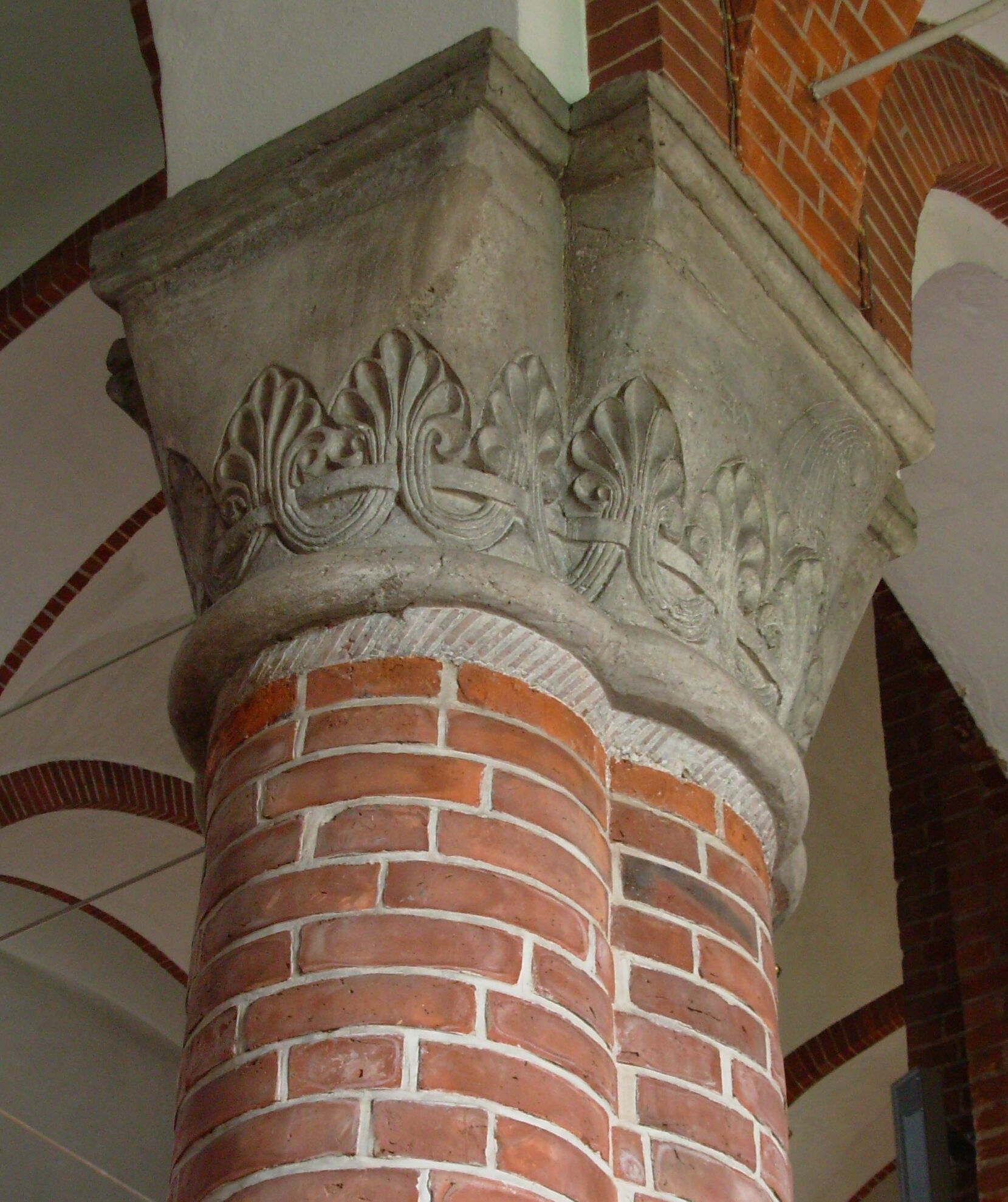 Kapitell einer Säule in der Marienkirche Segeberg